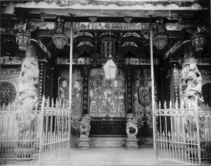 Foto. Saat foto diambil, Kota Makassar memiliki lebih dari 15.000 warga Tionghoa, atau hampir 20 persen dari total penduduknya. Karena pertumbuhan yang kuat di Makassar antara tahun 1890 dan 1920 terutama disebabkan oleh pertumbuhan yang kuat dalam perdagangan, kehadiran komunitas Tionghoa yang besar dan berkembang tidak benar-benar mengejutkan. Banyak dari orang Tionghoa adalah imigran baru yang telah membawa agama mereka sendiri dan tetap setia. Jadi ada juga kuil-kuil Cina (Klenteng) di samping masjid dan gereja. Anak-anak lelaki Tionghoa dan perempuan pribumi, disebut Tionghoa Peranakan, sering merupakan Muslim. (P. Boomgaard, 2001). Lukisan di serambi Klenteng di Makassar.